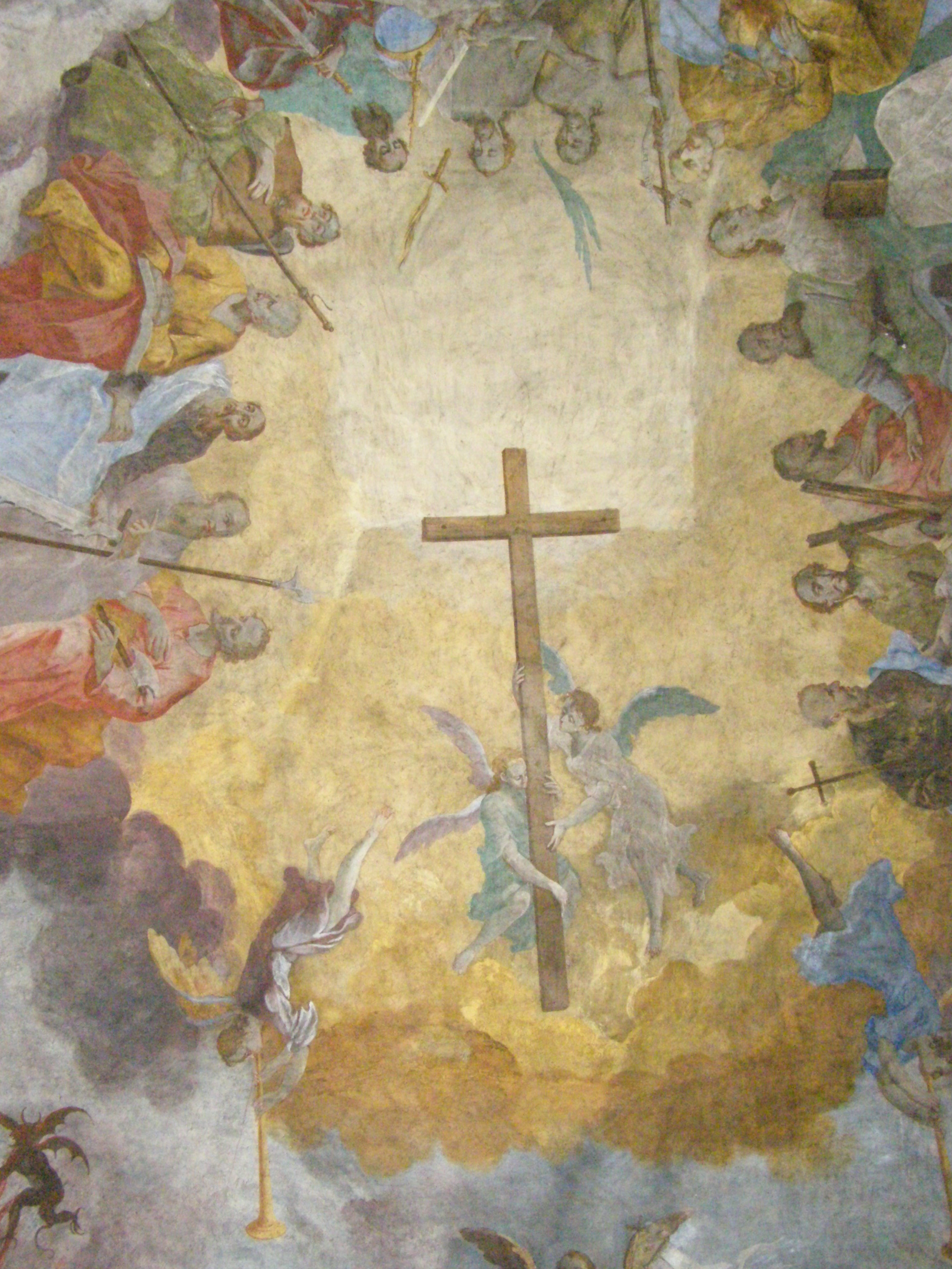 Freski w kaplicy kościoła kamedułów w Bieniszewie.